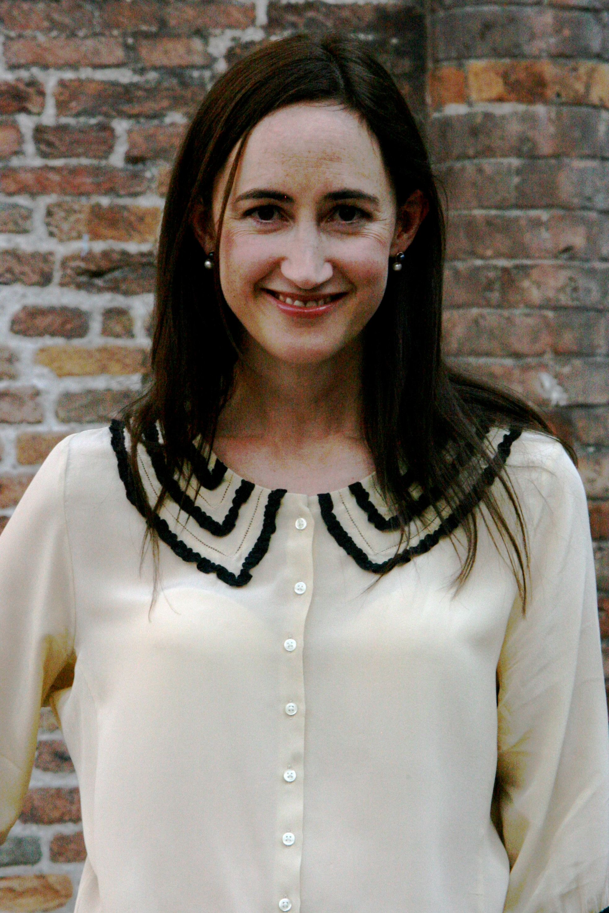 Sophie Kinsella al Festival della Letteratura di Mantova